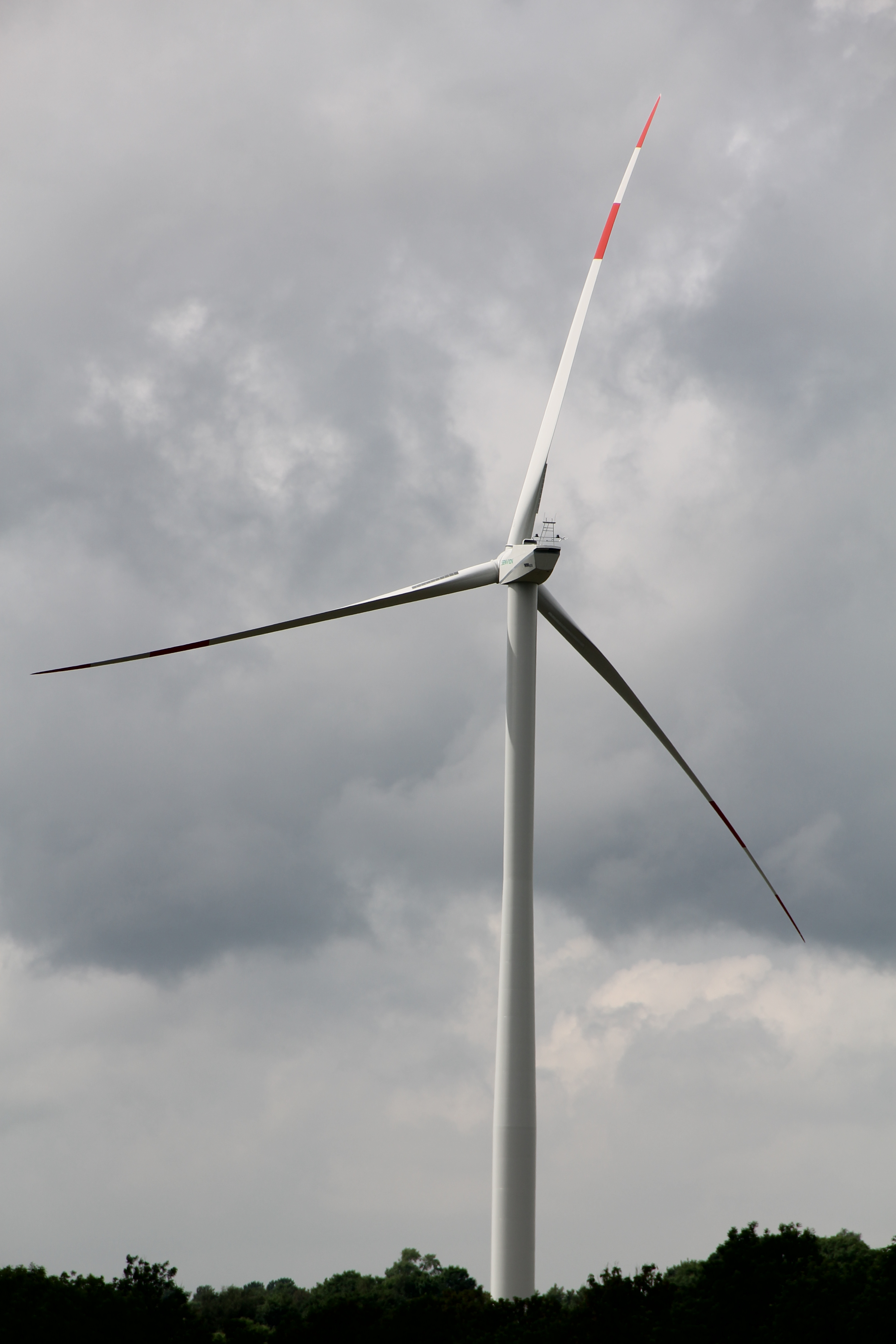 Windenerigeanlage Senvion MM100 in Bad Wünnenberg an der A44. Errichtung Mitte 2016.